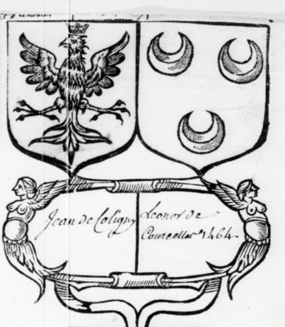 Blasons de Jean de Coligny et d'Éléonore de Courcelles présent dans le dossier Bleu 229 (famille de Damas)